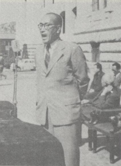 중앙청 본관 앞에서 훈시 중인 이범석(1948.09)